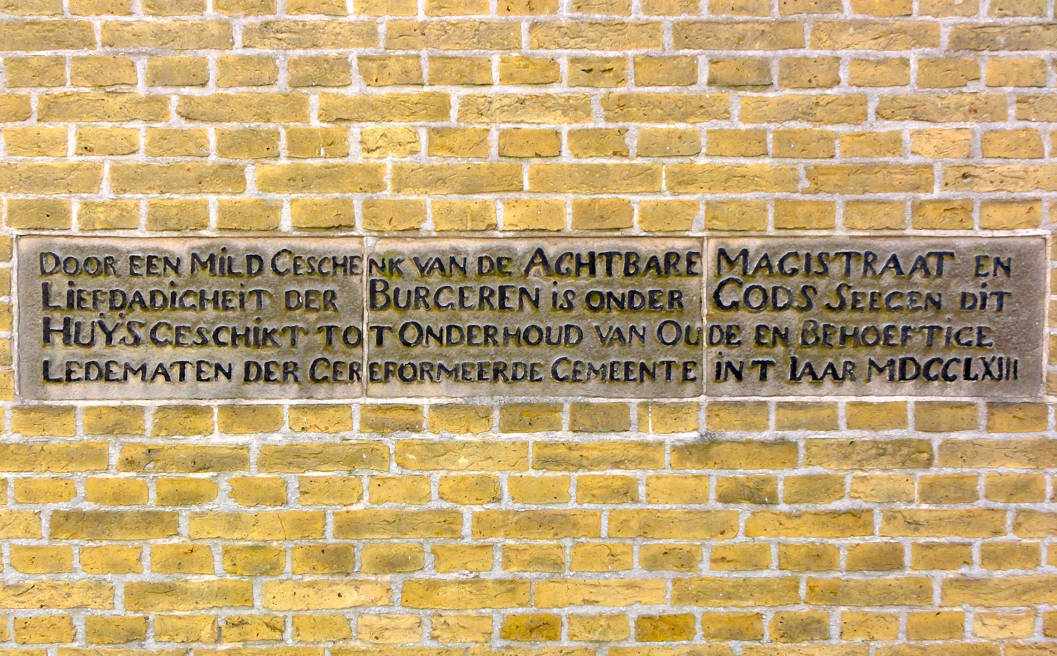 Stichtingssteen van het voormalig Hervormd rusthuis of oudeliedenhuis aan het Kerkpad in Harlingen